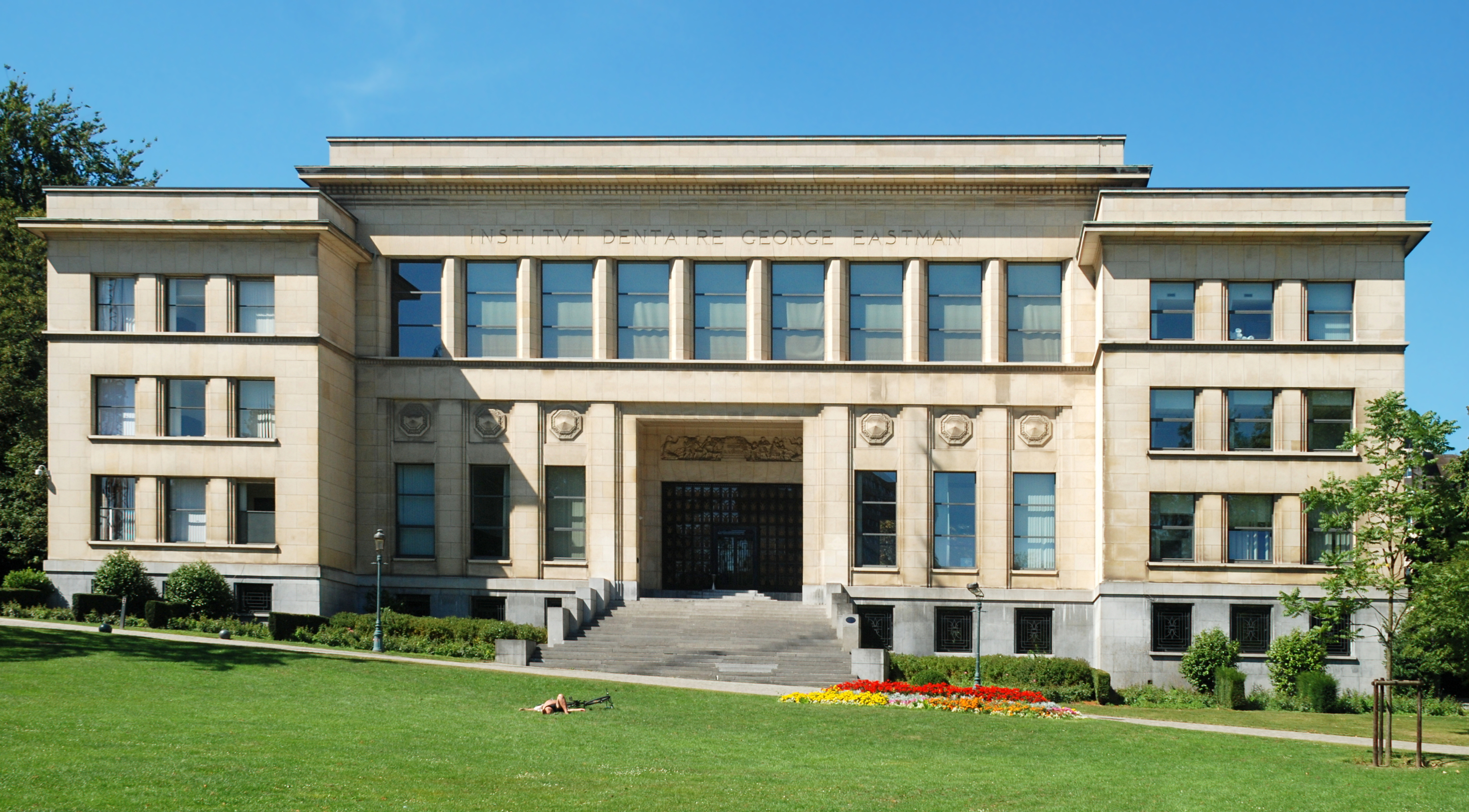 Belgique - Bruxelles - Institut dentaire George Eastman (Art déco - Michel Polak - 1934)